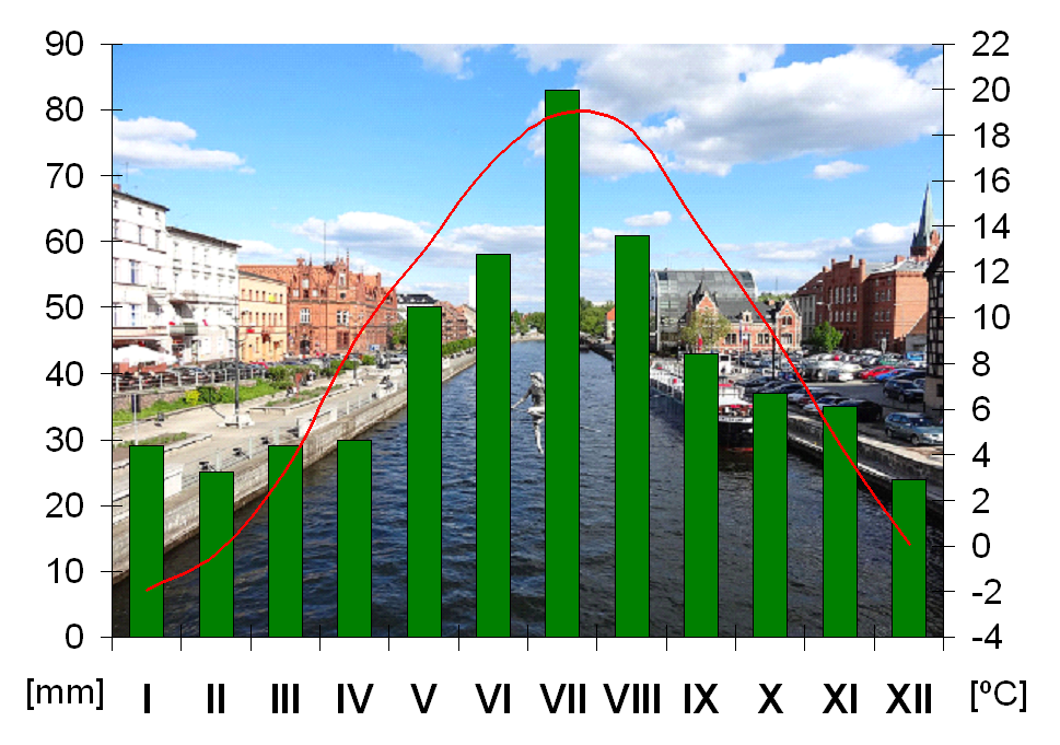 Klimatogram dla miasta Bydgoszczy na podstawie: "Dane z lat 1881-1960, A.T. Jankowski: Stosunki hydrograficzne Bydgoskiego Węzła Wodnego, opublikowano w Historia Bydgoszczy tom I, str. 38-40 oraz dane z lat 1945-1994, źródło: Warunki meteorologiczne w Bydgoszczy i okolic. [w:] Środowisko przyrodnicze Bydgoszczy. Praca pod red. Józefa Banaszaka. Wydawnictwo TANNAN. Bydgoszcz 1996"